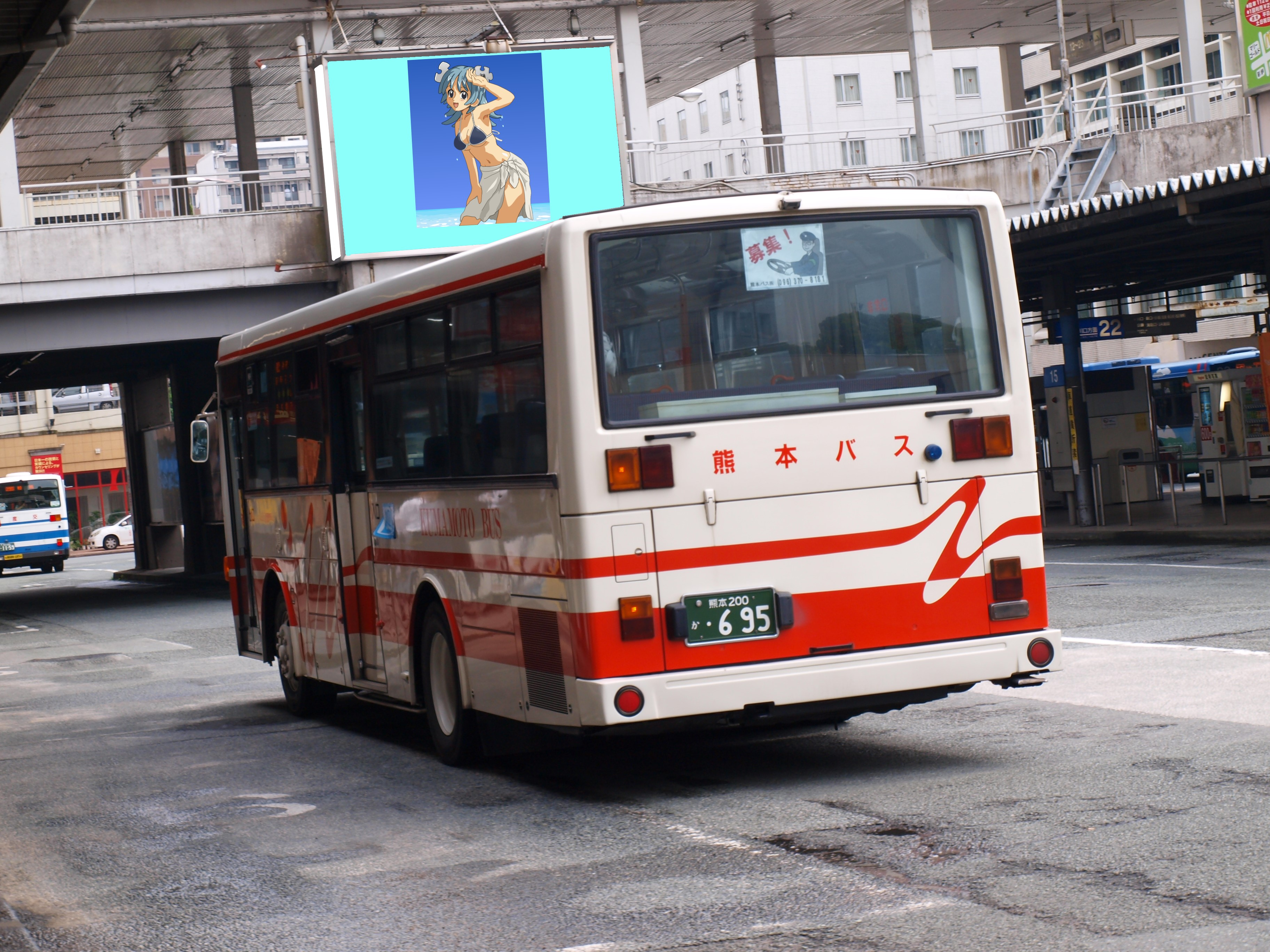 いすゞ・キュービック（富士重工17E型架装車、KC-LV380L、元京浜急行バス）、熊本バスで使用されるもの（熊本交通センターで撮影）